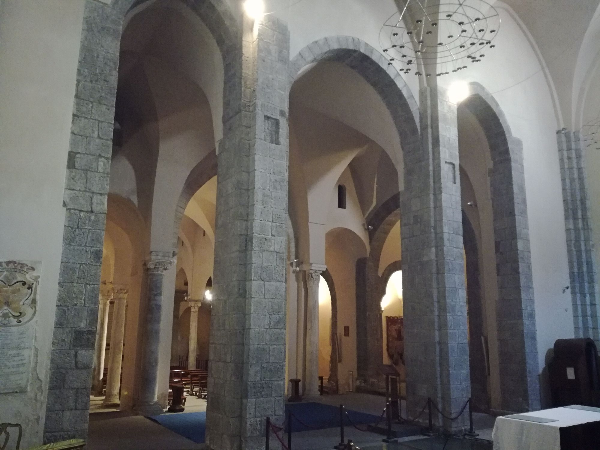 Interno San Giovanni a Mare (Napoli)